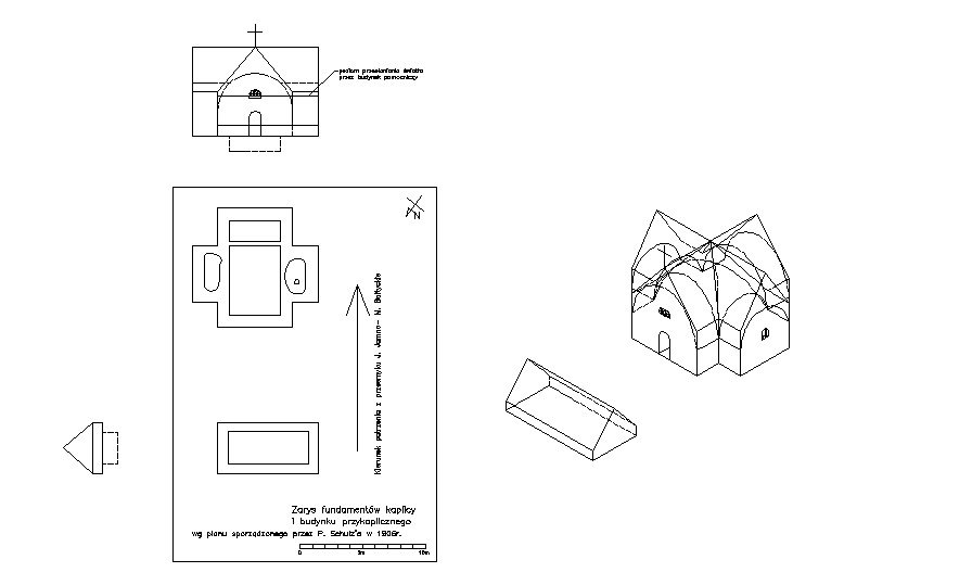 Hipotetyczne przedstawienie konstrukcji kaplicy